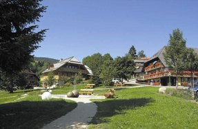 Parkanlage und Hotel